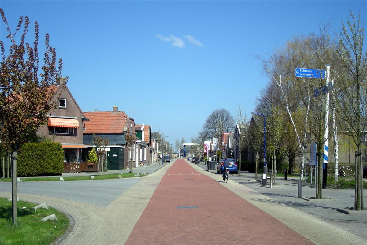 Echtenerbrug